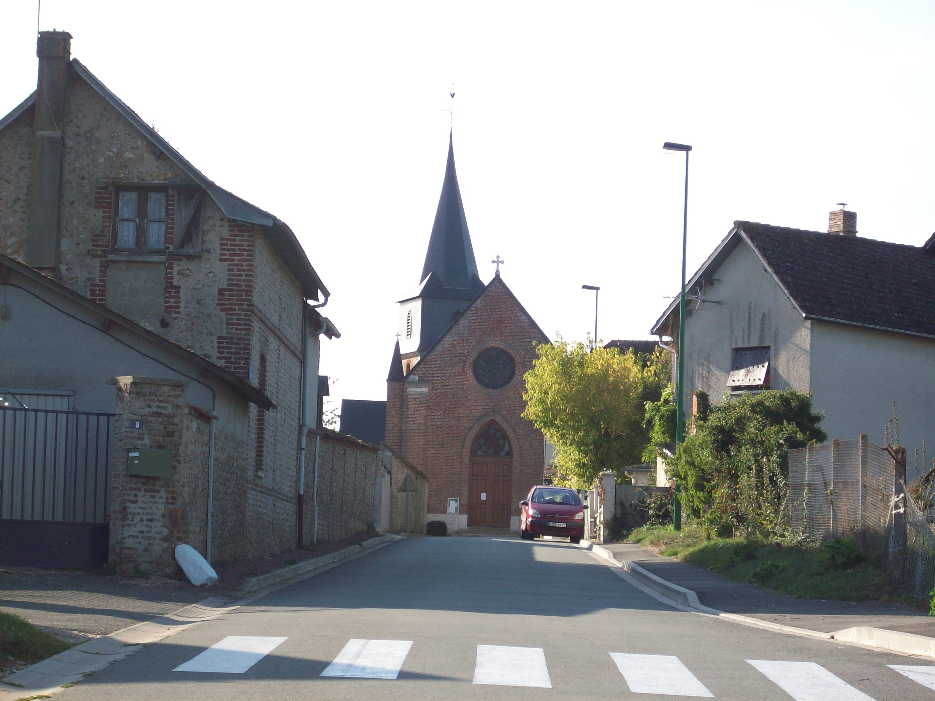 Vue de l'église de Flipou, en venant de la route de Pont-Saint-Pierre.